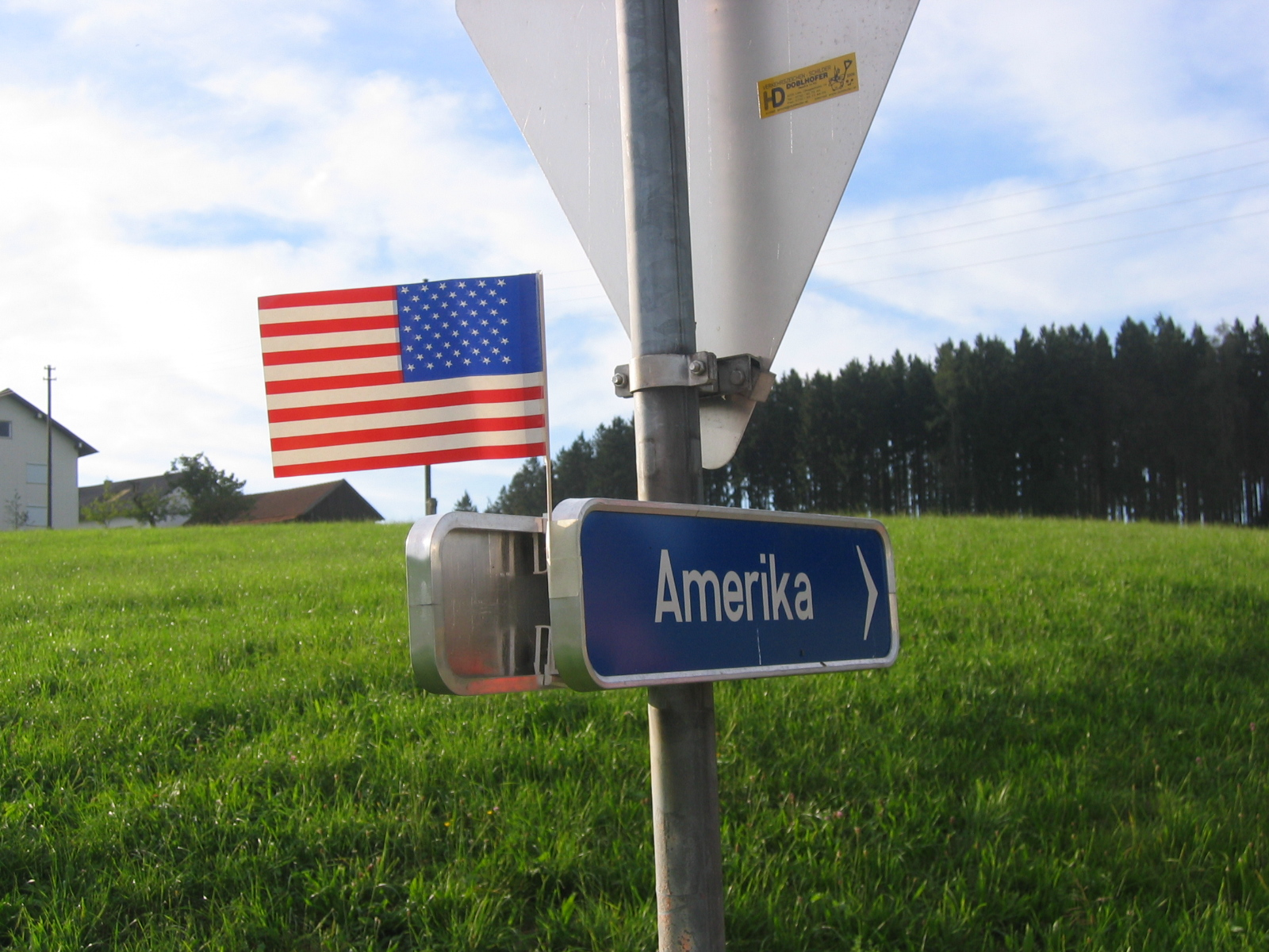 Amerika Zufahrtstafel in Eitzing.